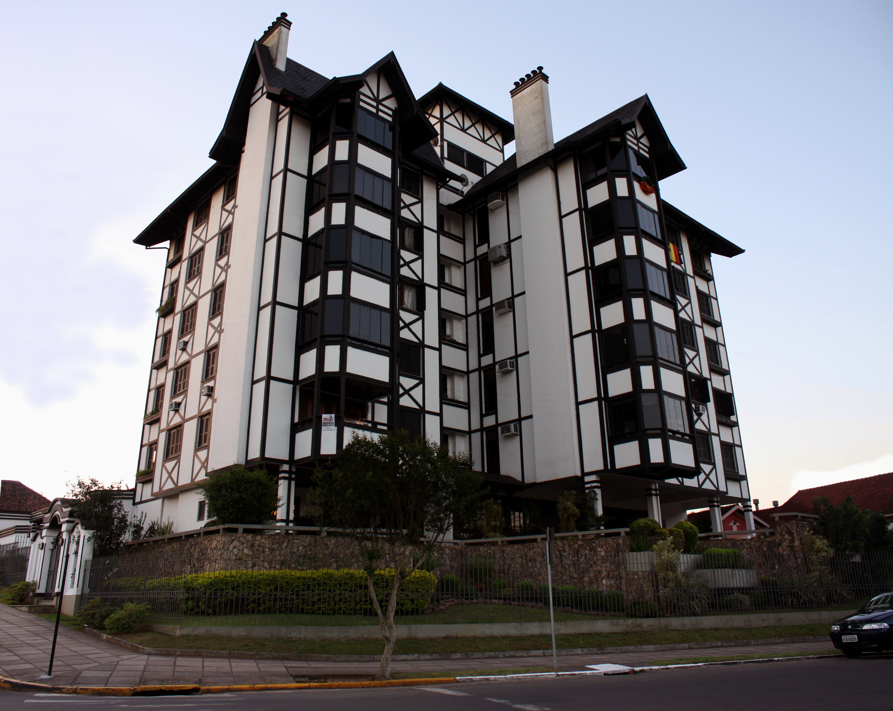 Edifício Heidelberg em Igrejinha/RS